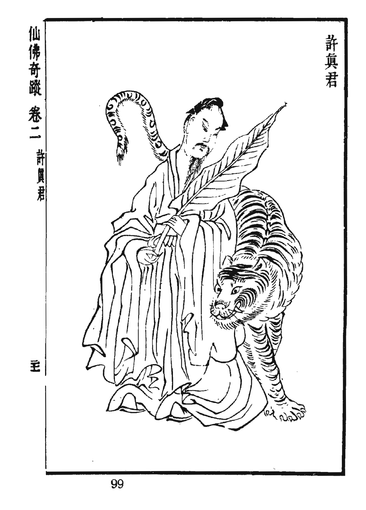 仙佛奇蹤插圖